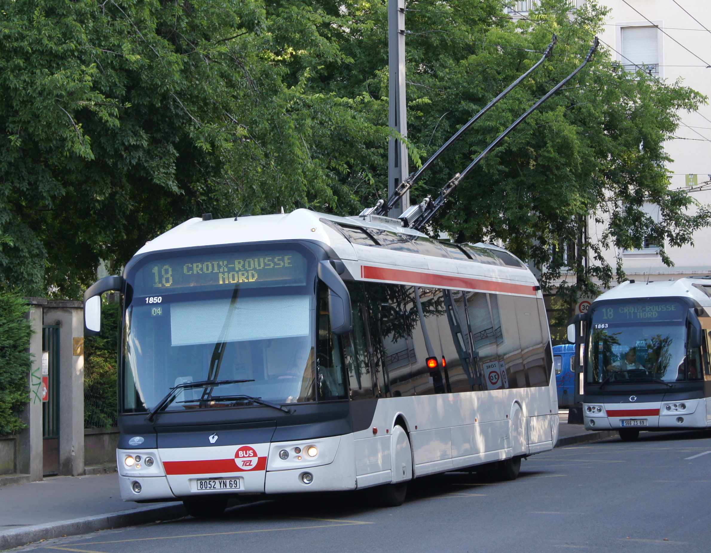 Cristalis ETB 12 à la Croix-Rousse, près de la station de métro Hénon (Lyon)